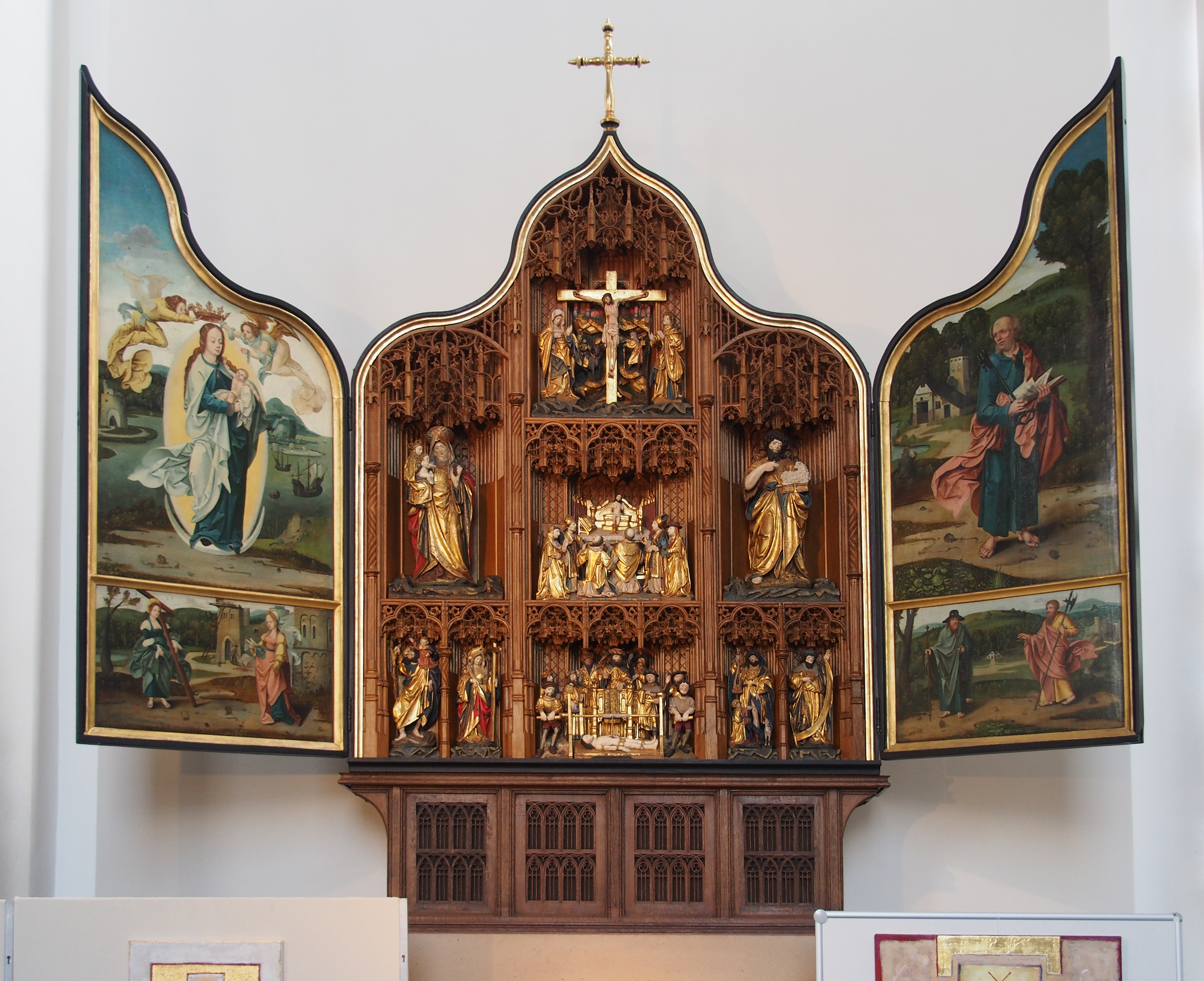 Flandrischer Schnitzaltar (um 1500), Nebenaltar in der Katholische Pfarrkirche St. Peter, Zülpich